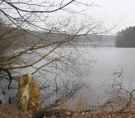 Schlachtensee, Berlin